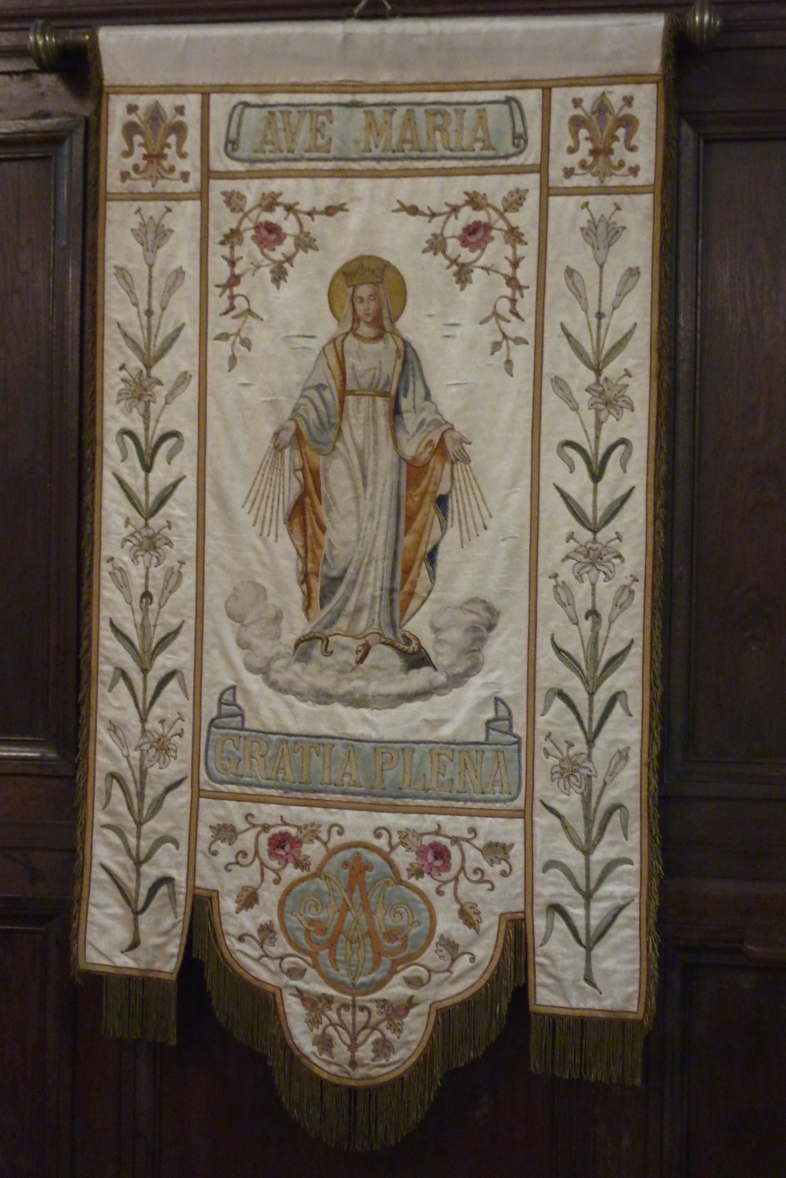 Katholische Pfarrkirche Saint-Corneille in Chartrettes im Département Seine-et-Marne in der Region Île-de-France (Frankreich), Prozessionsfahne, Darstellung: Maria Immaculata